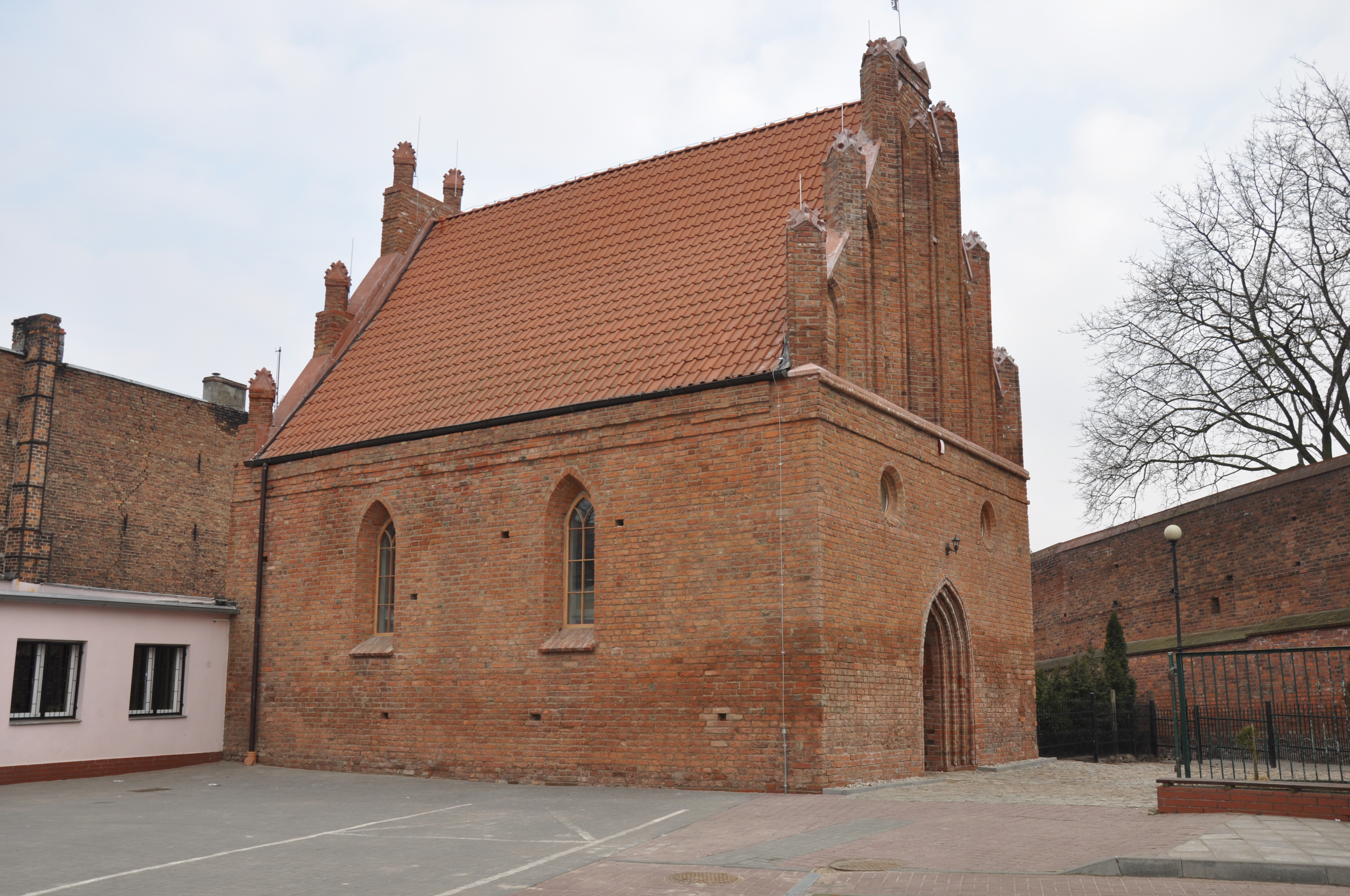 Chełmno, kaplica św. Marcina, ob. kościół fil., 1 poł. XIV